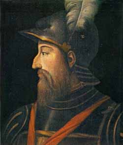 Fernando Francesco d'Avalos